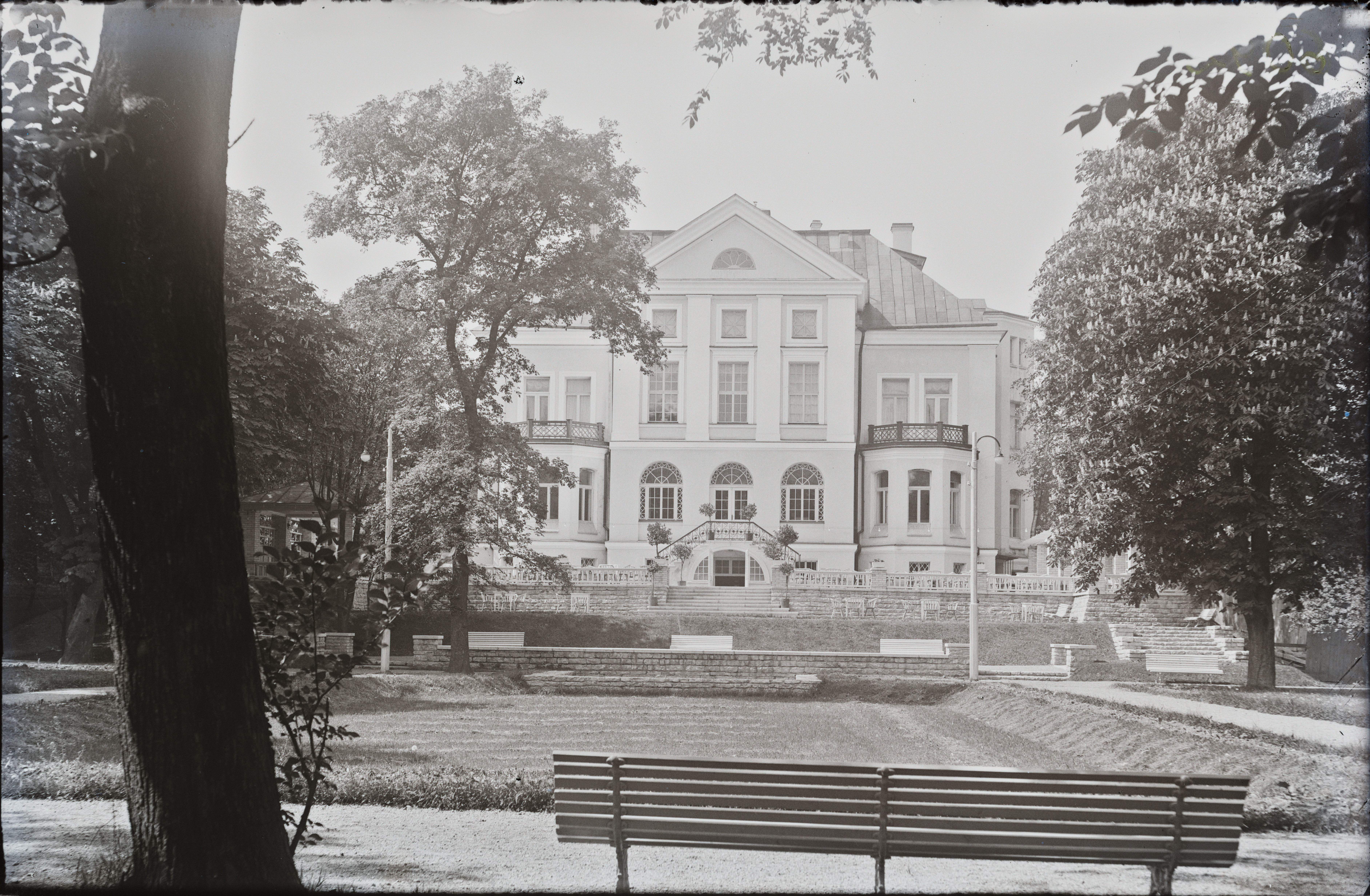 Tallinn, Seltskondlik Maja (Aia 12)